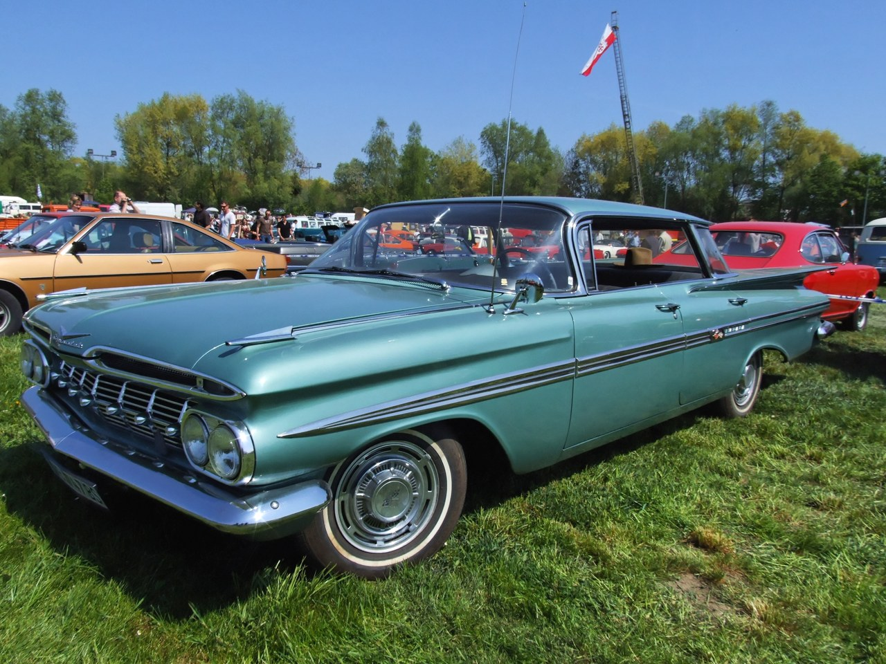 Quelle: selbst fotografiert, 04/2007 Fotograf: Späth Chr.